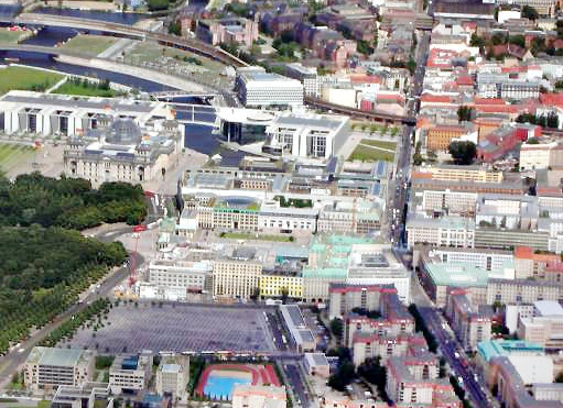 Berlin, Pariser Platz, Luftansicht